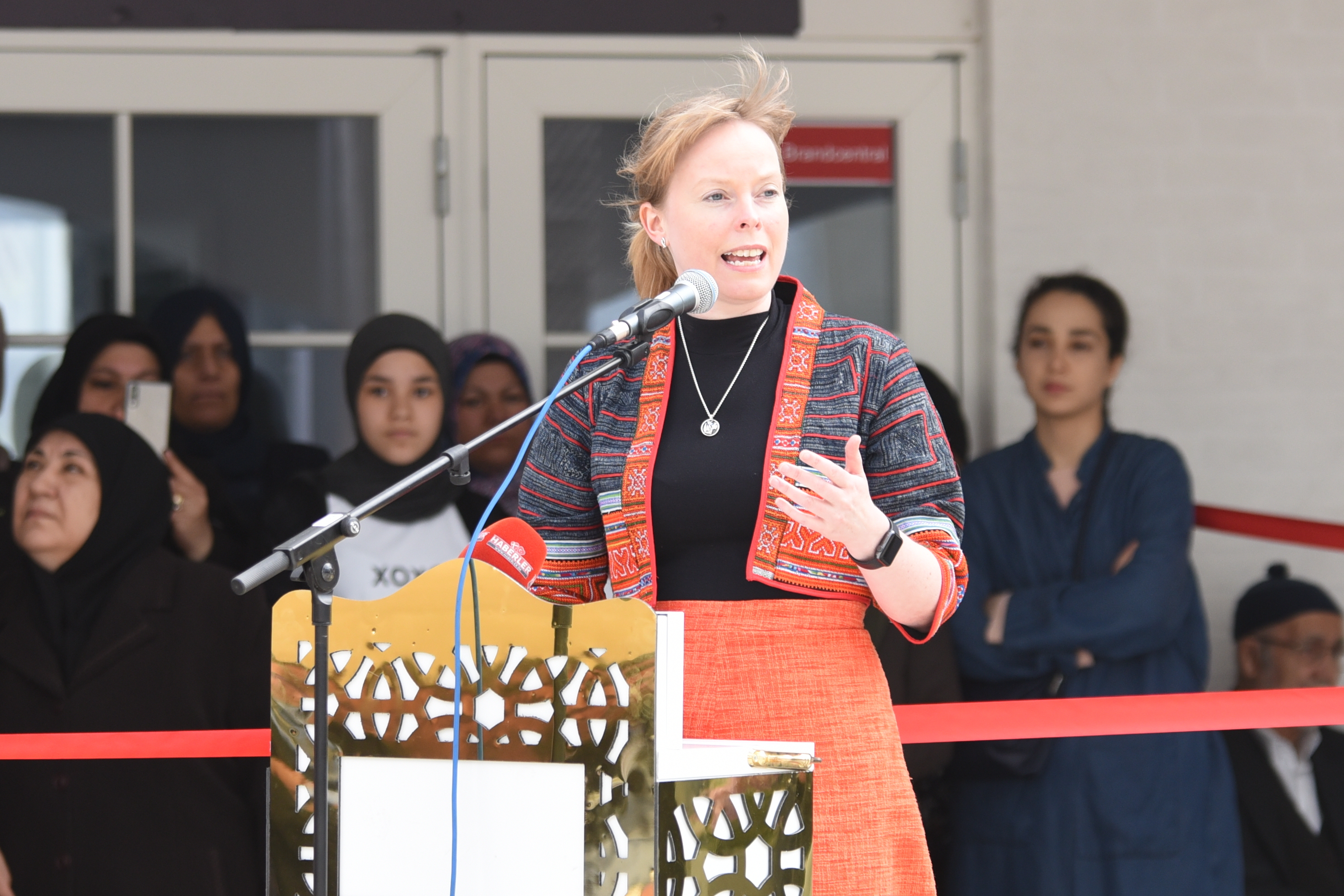 Joy Mogensen (S, Borgmester) holder tale